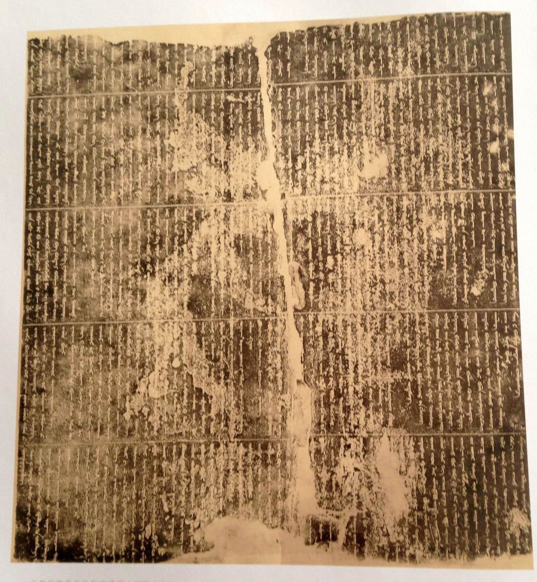 元文宗至顺二年（1331年），由虞集撰文，巎巎书丹，赵世延篆额的亦都护高昌王世勋残碑（部分）